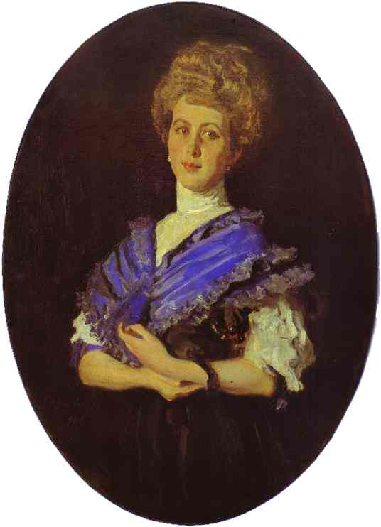 Portrait of Elisaveta Karzinkina